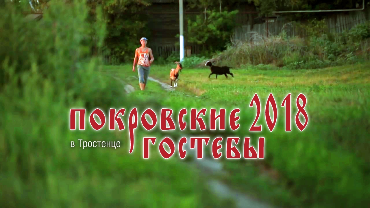 Банер фестиваля «Покровские гостёбы 2018»